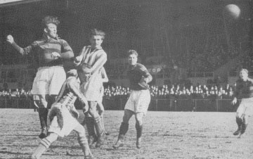 Football match between Danish sides Boldklubben Frem and Akademisk Boldklub. Frem players (cross-striped): Pauli Jørgensen (far left), Johannes Pløger (2nd from right) and Erling Sørensen (far right).